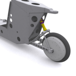 Aandrijving van de Twente One